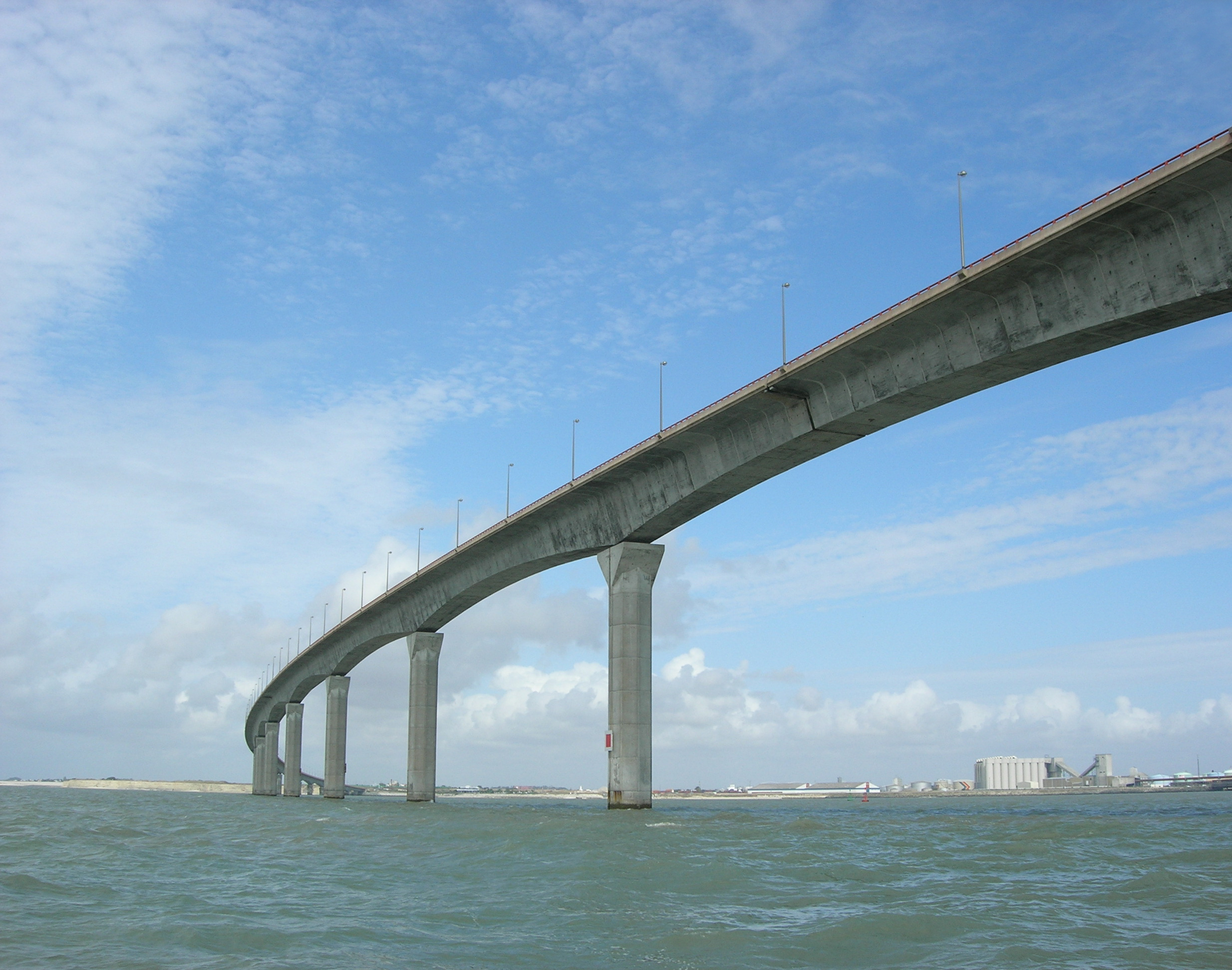 Description =Pont de l'Ile de Ré avec le port de La Palice Source =Photo taken by Remi Jouan Date =Aout 2005 Author =Remi Jouan